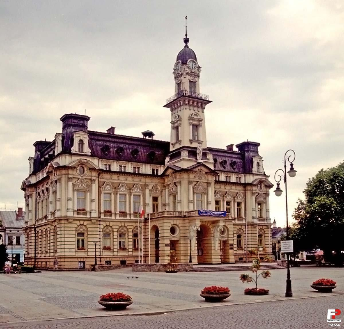 Ratusz w mglistym dniu.